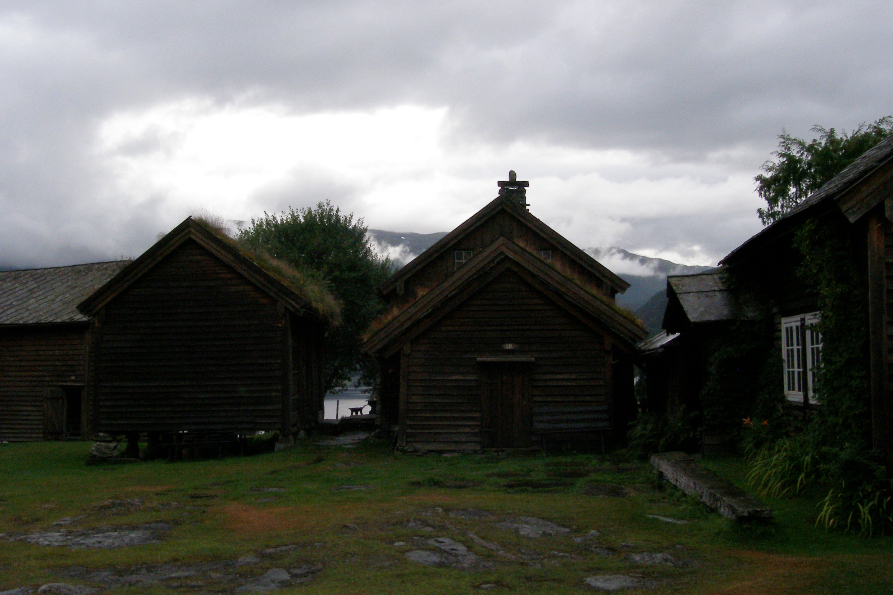 Voss Folkemuseum in Voss, Norway